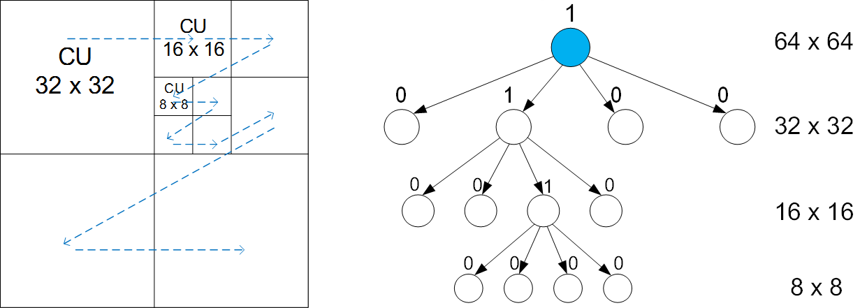 CU與Quadtree的對應圖